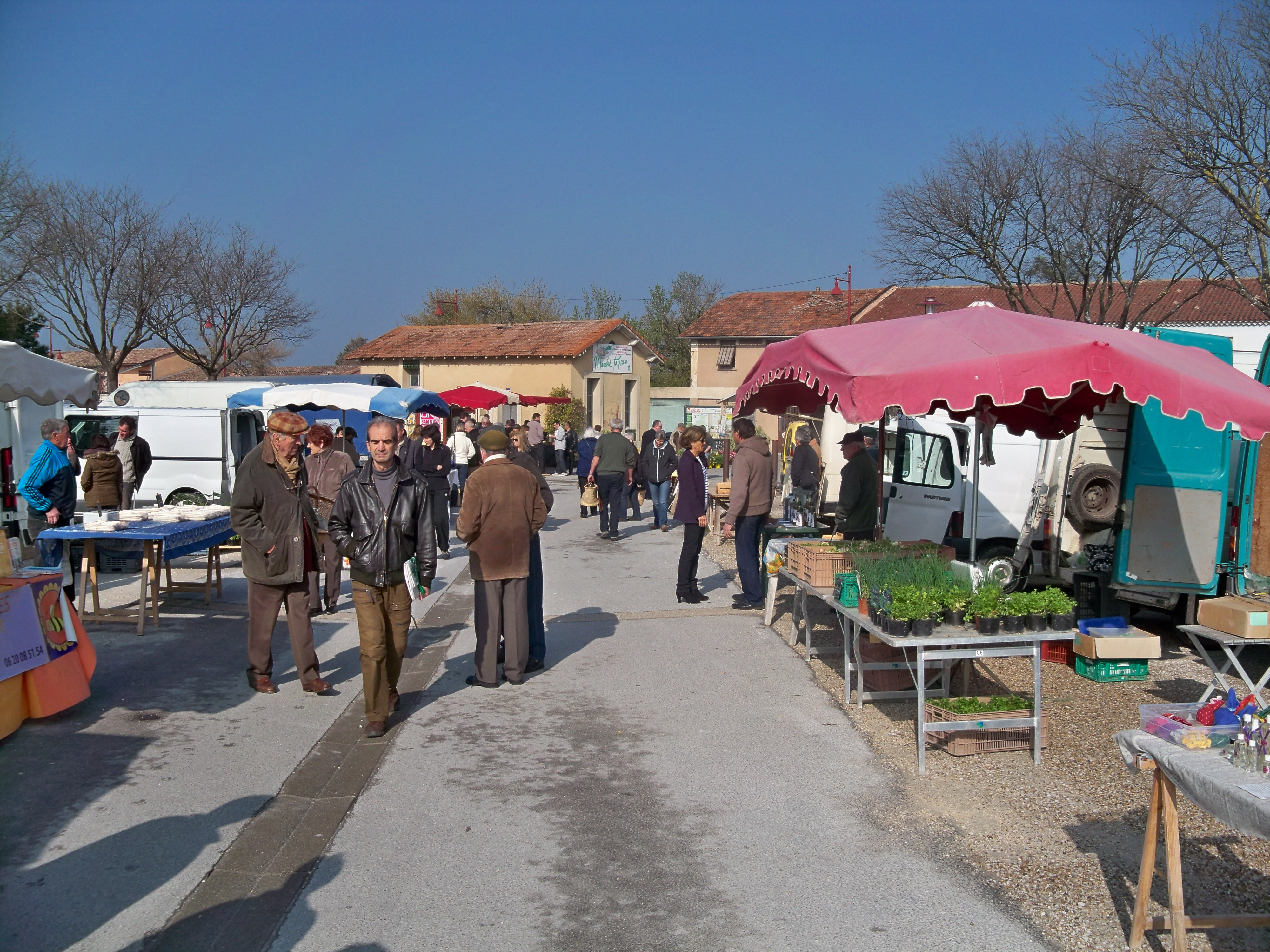 marché de Coustellet (84)